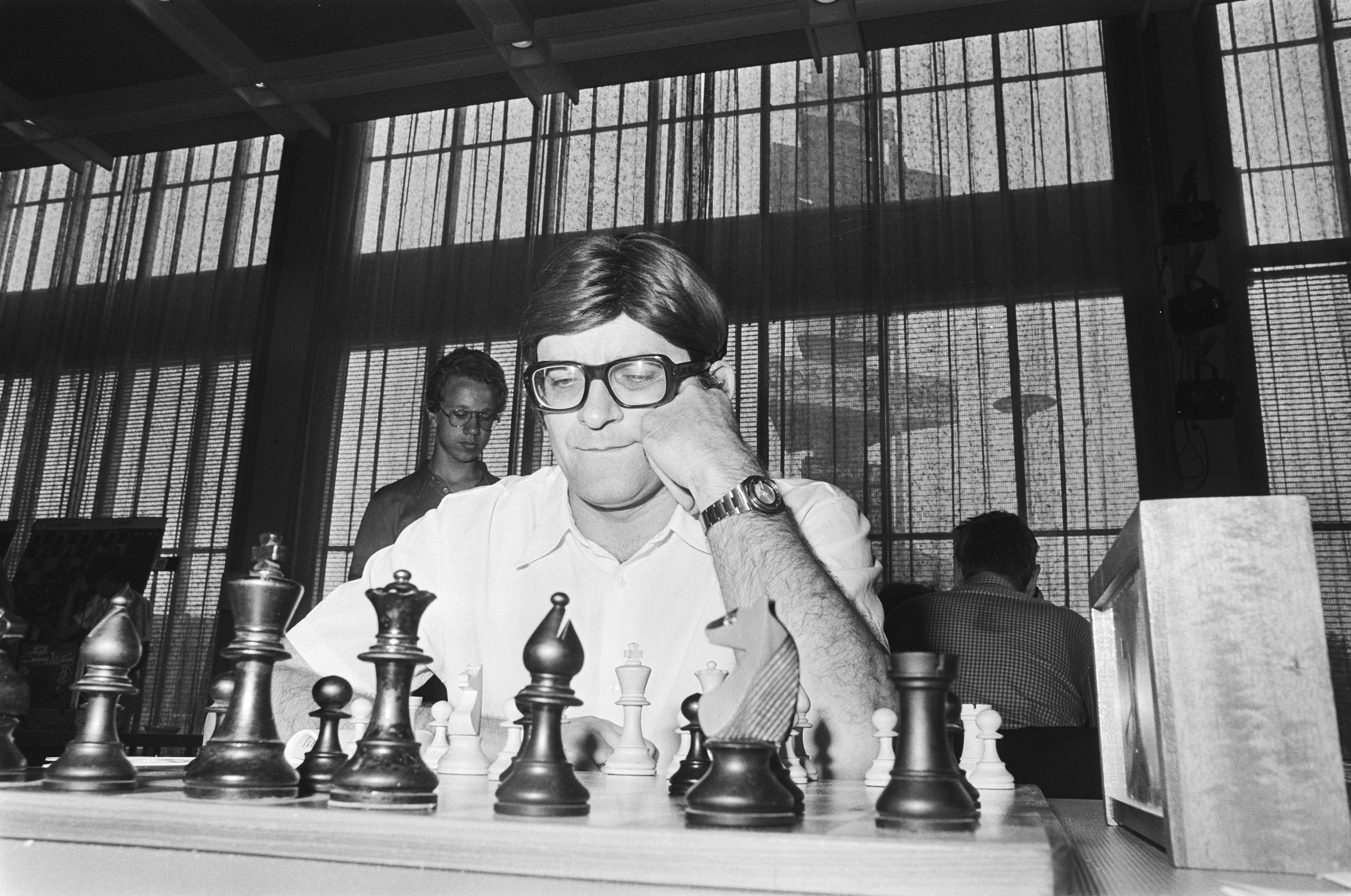 IBM-schaaktoernooi in Amsterdam 1977; Liberzon aan zet.